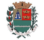 Brasão de Sertãozinho (São Paulo). O desenho do Brasão ficou a cargo do desenhista José Arnaldo de Azevedo. O projeto de lei Instituindo o Brasão de Armas do Município de Sertãozinho foi apresentado na sessão da Câmara Municipal no dia 3 de Agosto de 1956 pelo vereador Dr. Antônio Furlan Junior’, sendo aprovado por unanimidade.